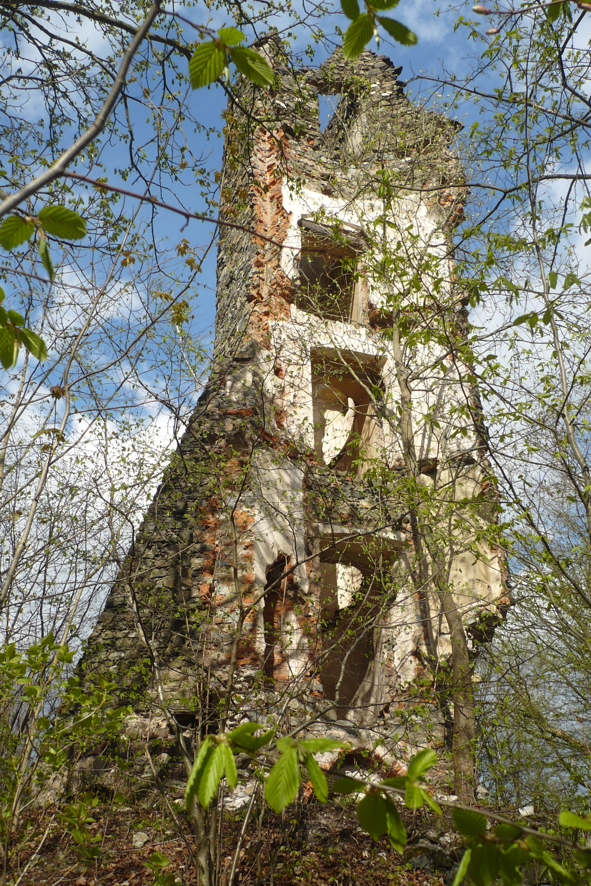 Wieża na Grodziszczu